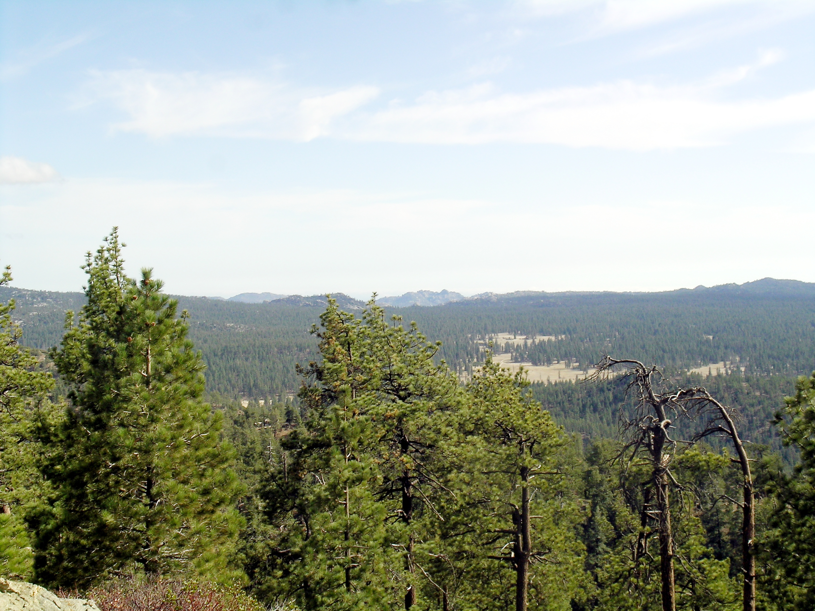 Sierra San Pedro Martir in Baja California, Mexico. Trees are Pinus jeffreyi.